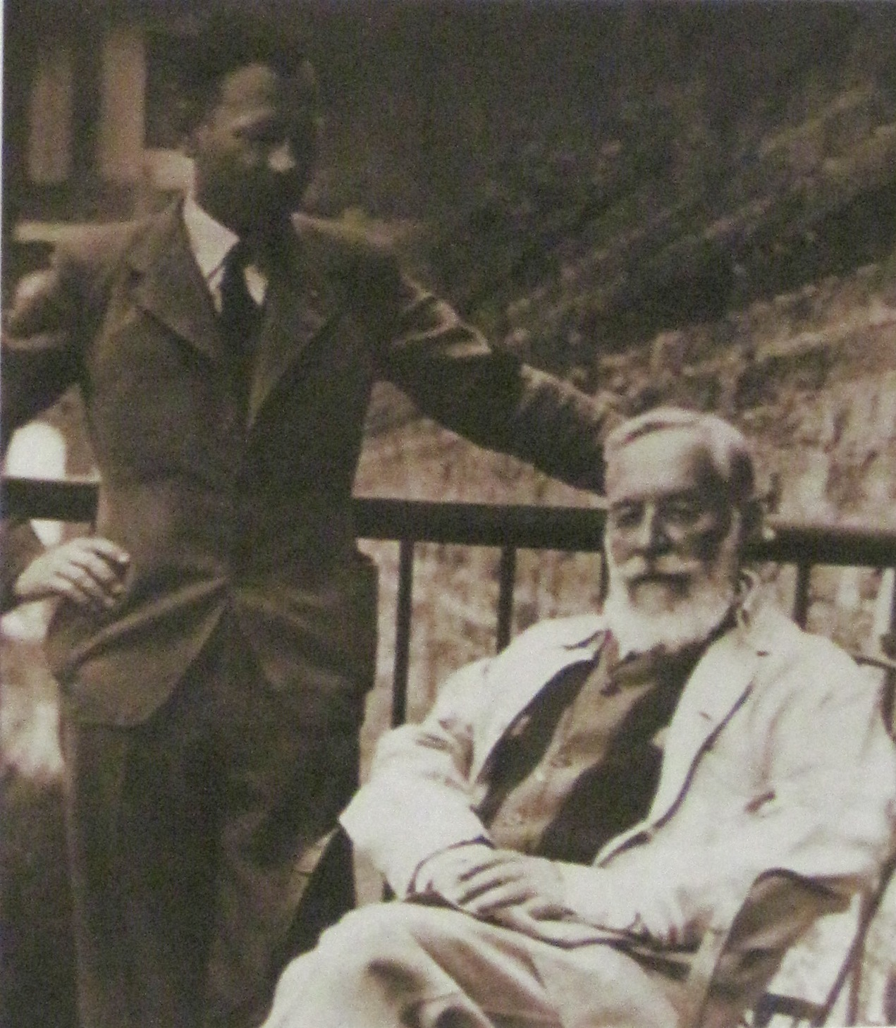 Князь Мікалай Святаполк-Мірскі на гаўбцу Мірскага замка